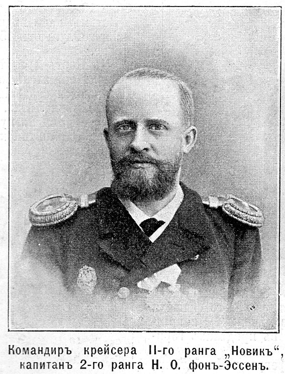 Командир крейсера II-го ранга "Новик" капитан 2-го ранга Н.О.фон Эссен